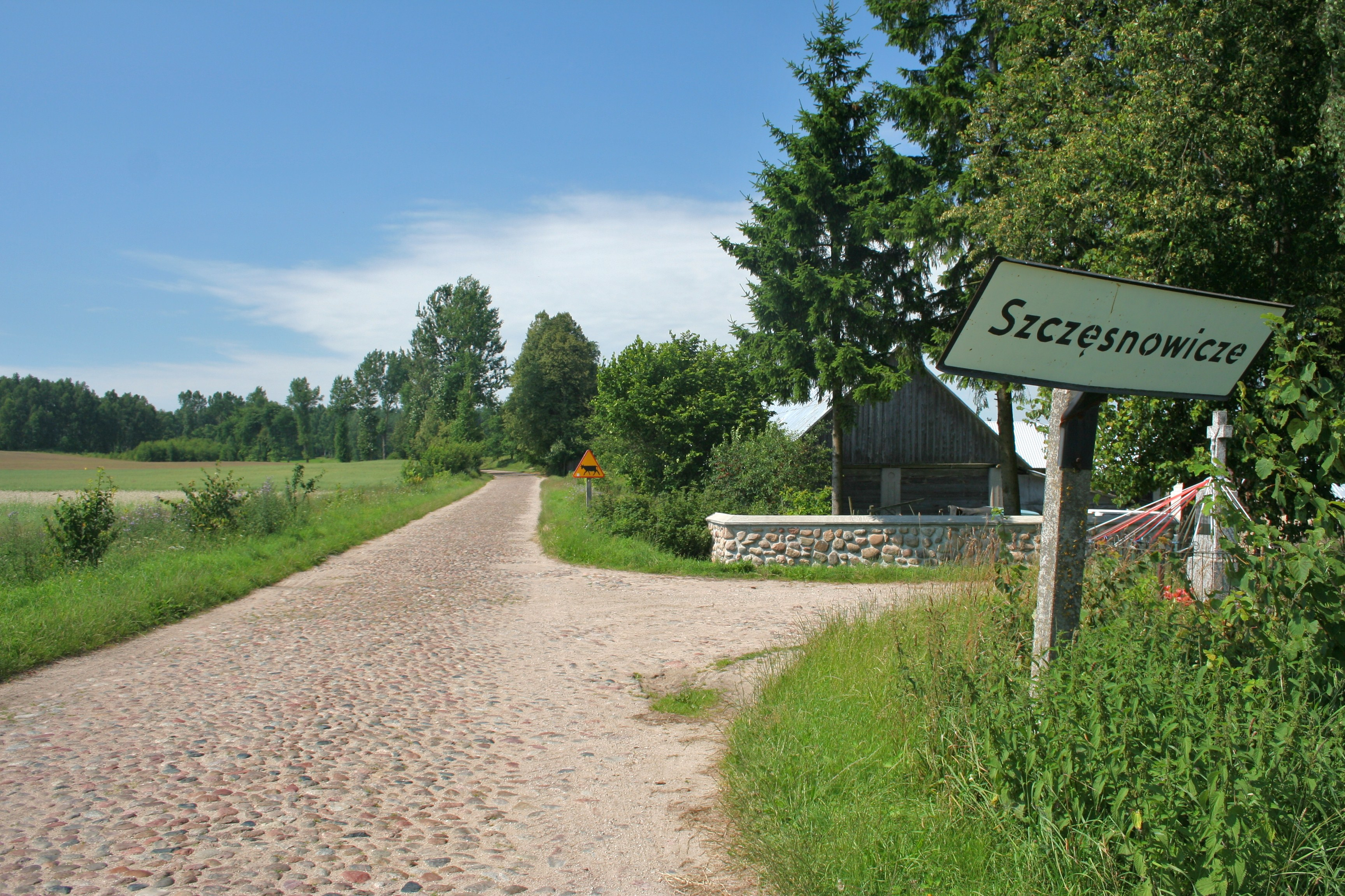 Droga wjazdowa do wsi Szczęsnowicze.